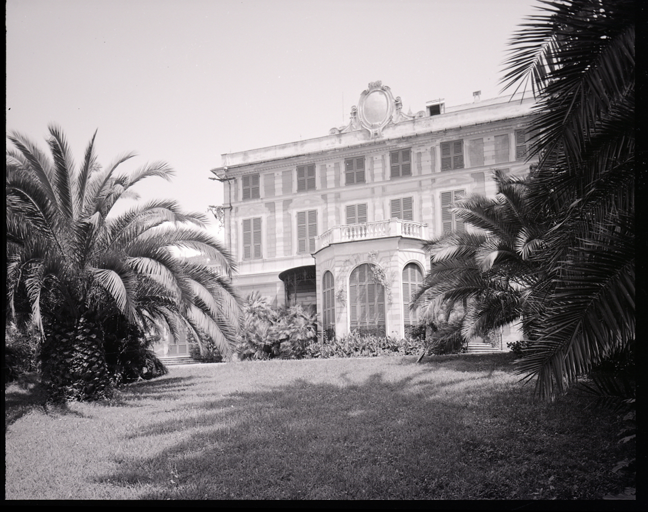 Riviera di Levante. Genova. Nervi. Villa Gropallo, Serra, ora del Comune. Facciata Villa Gropallo. Vista leggermente scorciatacon elemento pentagonale al centro. Vedute e particolari del parco. Servizio fotografico : Genova, 1963 / Paolo Monti. - Buste: 8, Fototipi: 8 : Negativo b/n, gelatina bromuro d'argento/ pellicola ; 10x12. - ((Serie costituita da 8 buste sciolte di negativi identificati con i nn.: 6571, 6572, 6573, 6574, 6575, 6576, 6577, 6578. - Il negativo identificato con il numero 46397 è stato realizzato per Zodiac. - Occasione: Documentazione per la pubblicazione: Italia Nostra (a cura di), "Le ville genovesi", catalogo della mostra, Genova 1962, Genova, Comune di Genova, 1967. - Fonte: Monografia di Italia Nostra (a cura di): Le ville genovesi, catalogo della mostra, Genova 1962, Genova, Comune di Genova (1967). - Fonte: Lettera di Paolo Monti: I. Carteggi/ Genova - Enrico (1963-1966), presso Archivio Paolo Monti. Camicia con documenti dattiloscritti e manoscritti vari relativi al lavoro eseguito per Italia Nostra: preventivi, lettere, inventari. - Fonte: Rubrica di Paolo Monti: Archivio fino 1-4-1961/ 31-3-1963 (1961-1963), presso Archivio Paolo Monti. - Fonte: Agenda di Paolo Monti: R 1 - Monti/ 1 aprile 1963 - 6 giugno 1964/ 6000-8193 (1963-1964), presso Archivio Paolo Monti